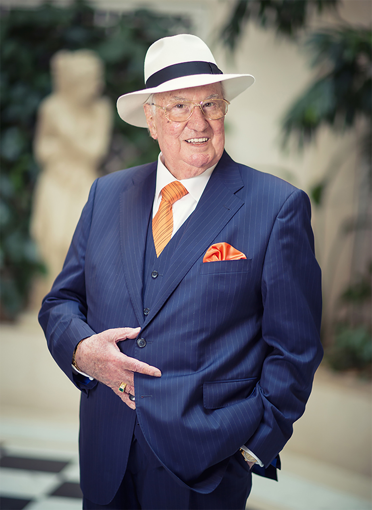 Unternehmer aus Nordrach